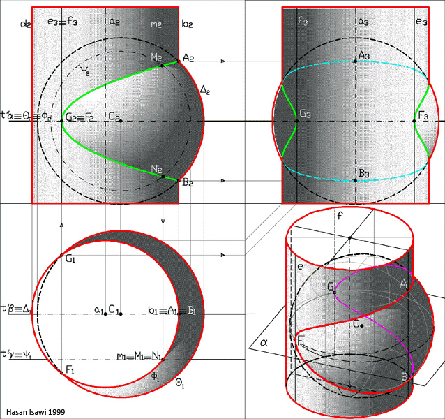 Intersezione tra un cilindro e una sfera Nei vari casi il tipo di curva d’intersezione dipende sia dalla reciproca posizione degli assi delle due superfici che dalla misura del loro diametro. I casi sono i seguenti: Si pone che il cilindro è posizionato in modo tale da avere tutte le generatrici secanti e l’asse non passante per il centro c della sfera. La quartica d’intersezione che si ottiene è digrammica, composta da due rami simmetrici rispetto al piano di profilo d e perciò le seguenti descrizioni sono riferite ad un solo ramo. Nelle condizioni di giacitura in esame è conveniente l'utilizzo dei piani secanti sia frontali che orizzontali, poiché questi piani sezionano il cilindro secondo e la sfera secondo circonferenze.